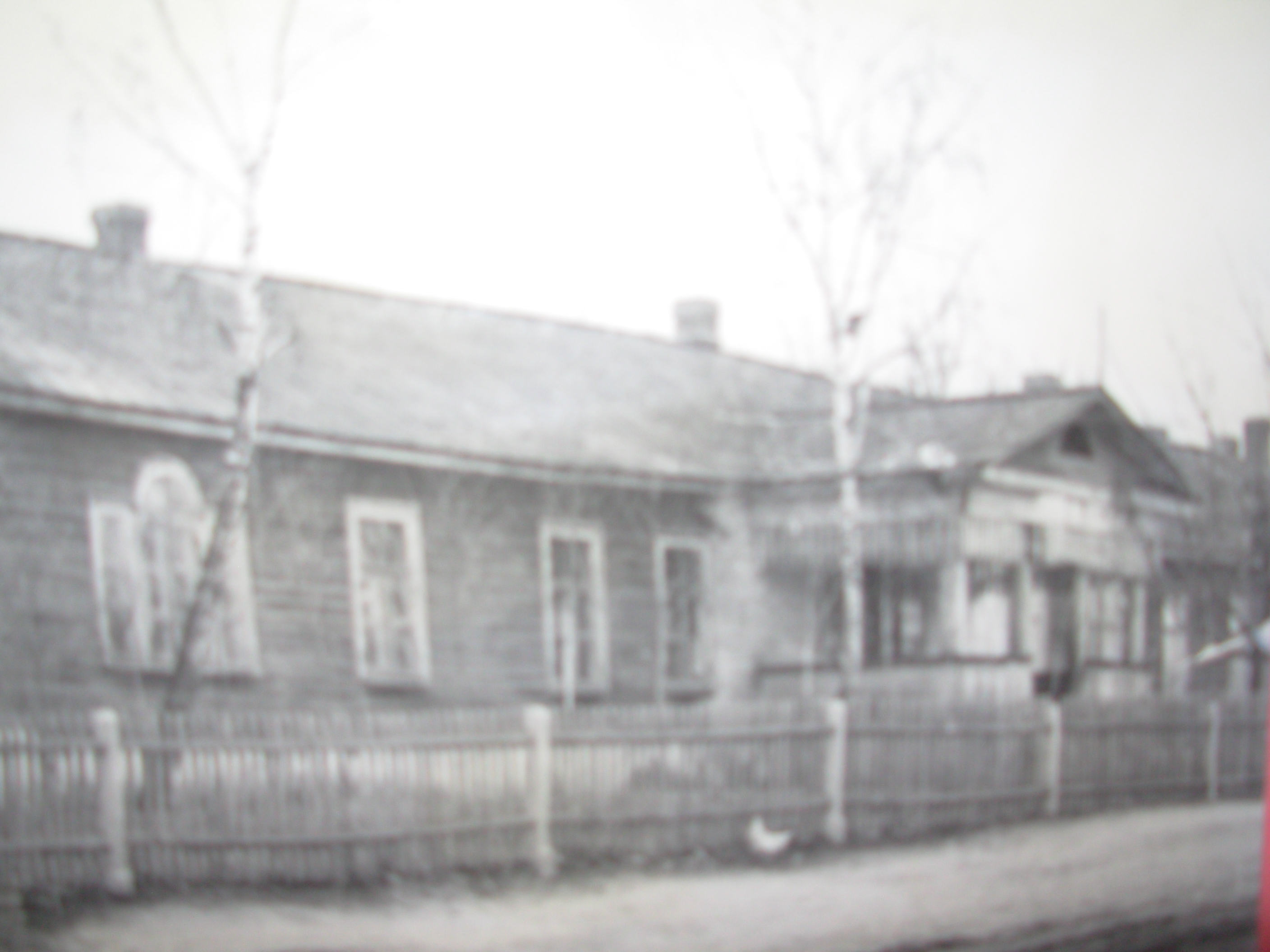 Беларуская (тарашкевіца): Панскі дом у Вусьці